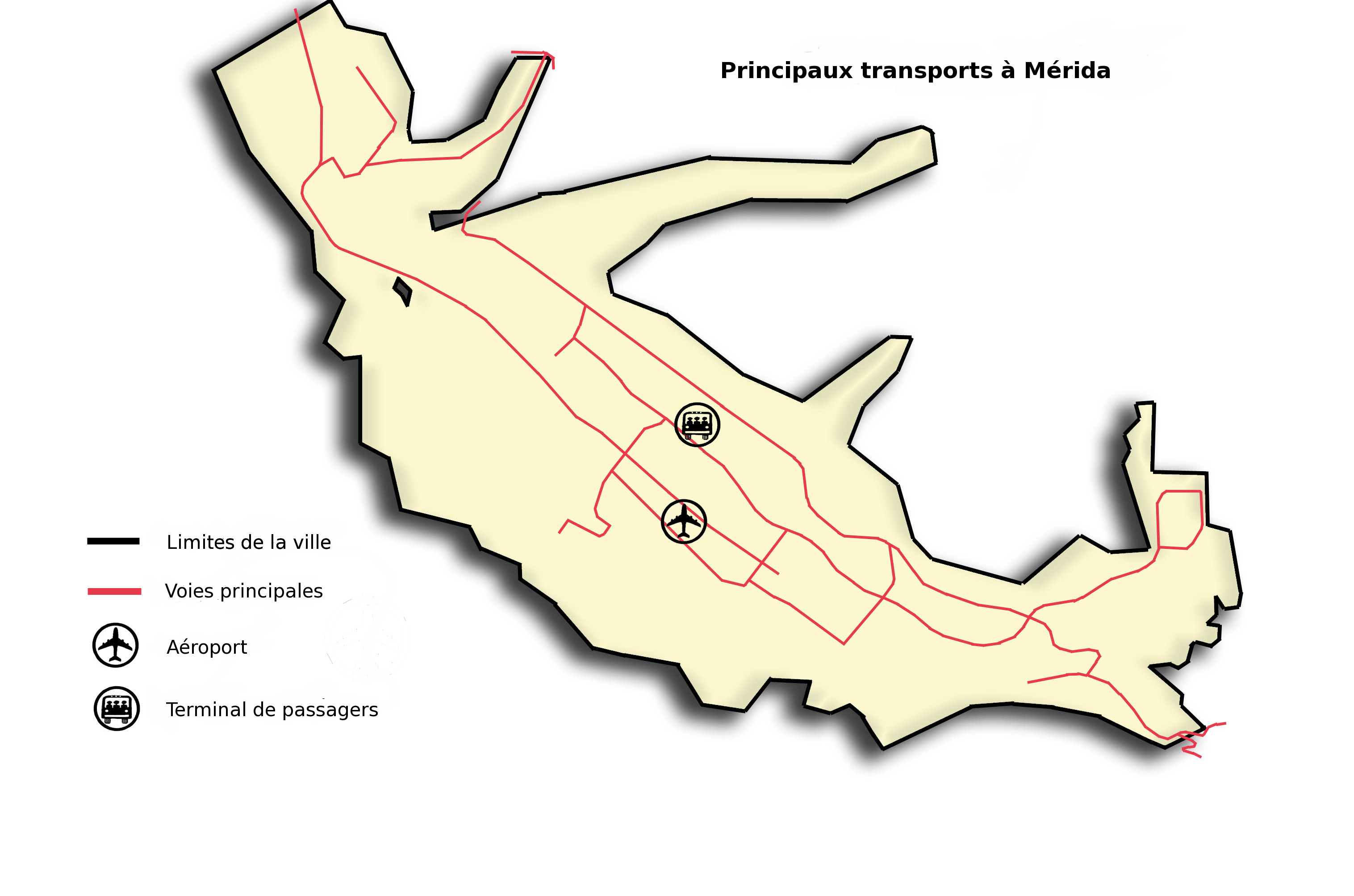 Traduction de la carte depuis l'espagnol